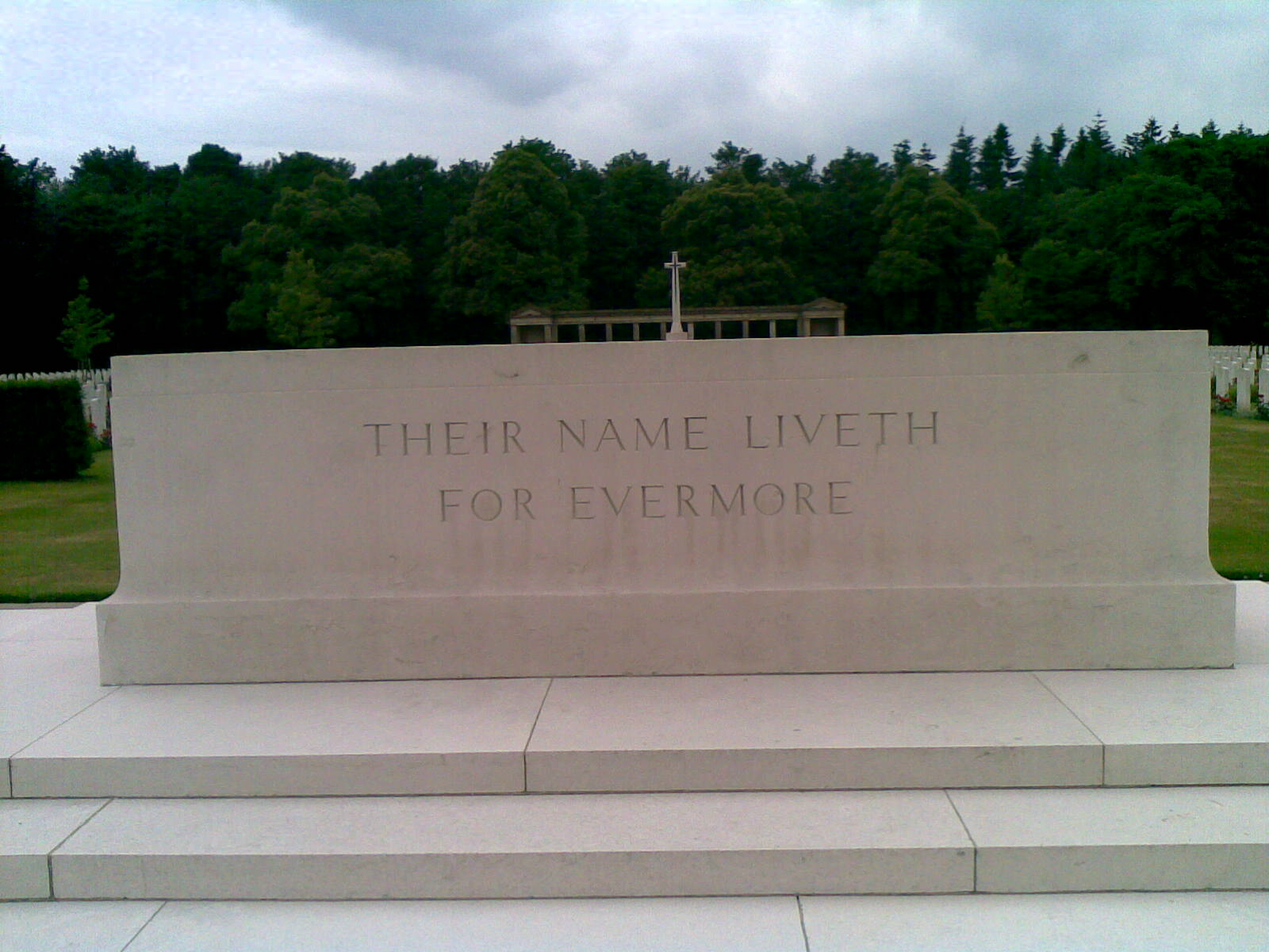 Rheinberg War Cemetery- Altarstein mit Aufschrift